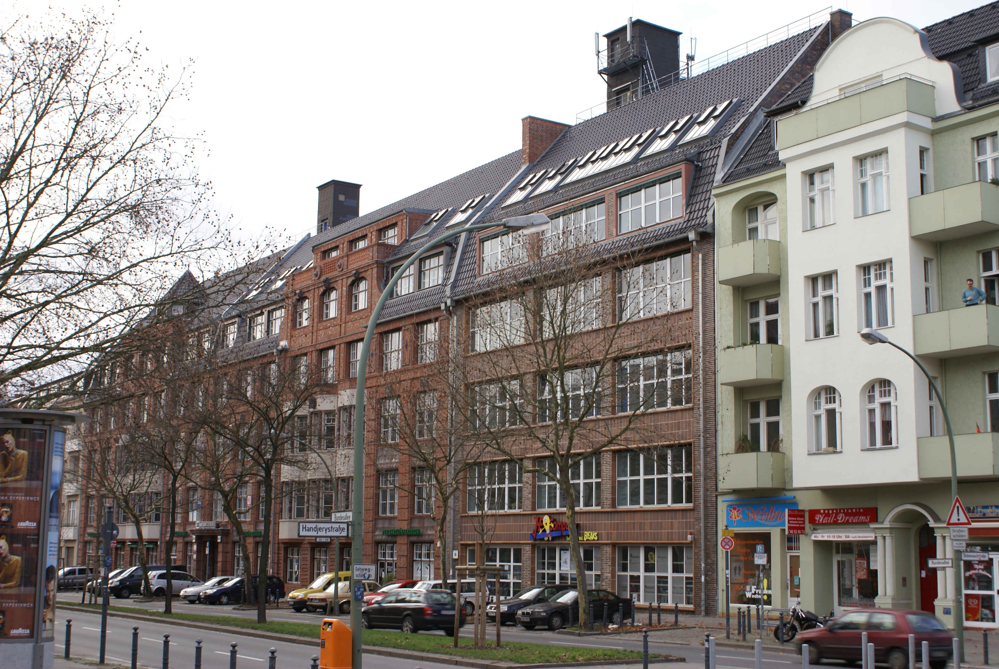 Stammhaus der Askania AG in der Bundesallee (Berlin)